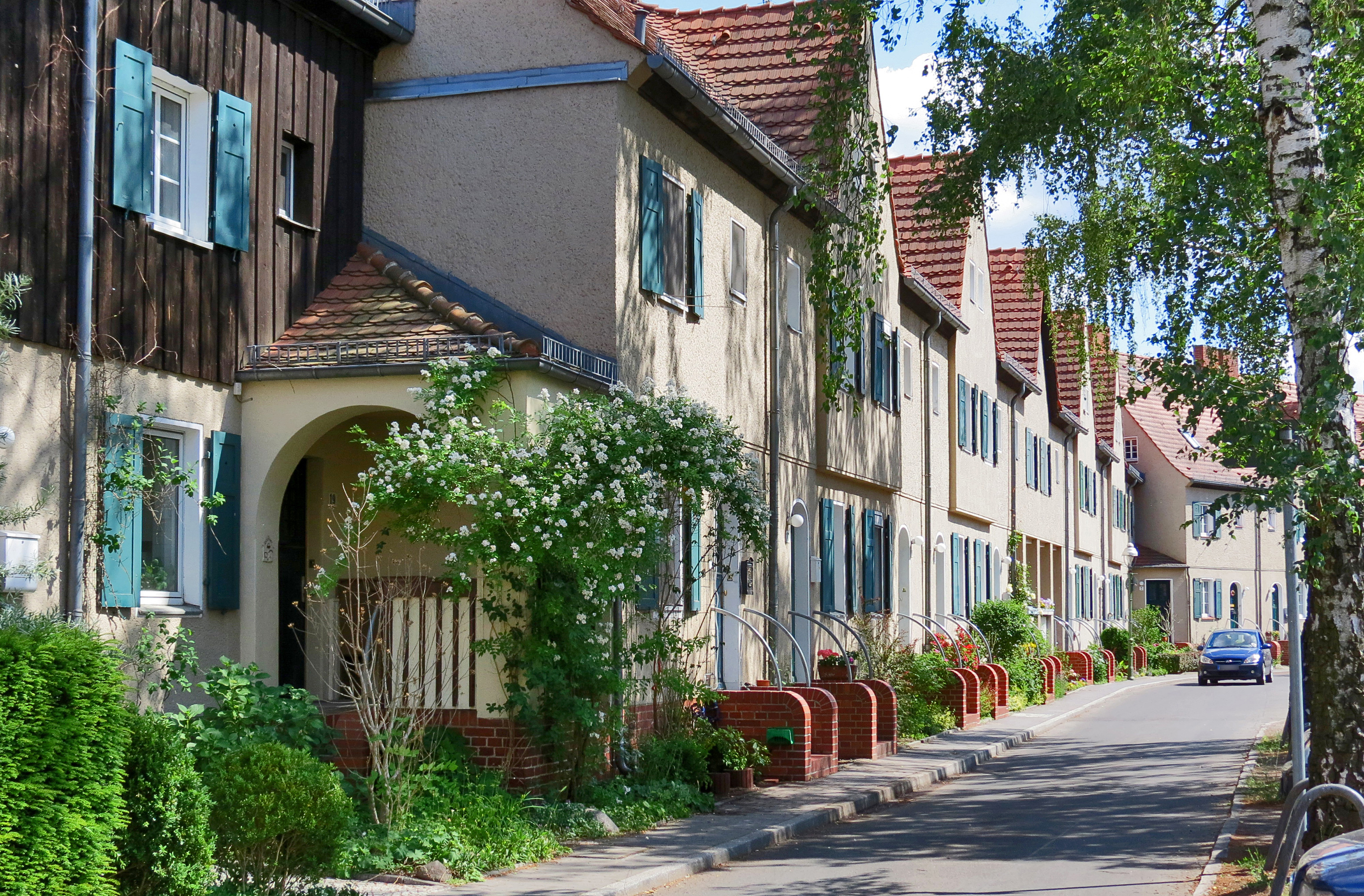 Eichenweg 19 (Berlin-Hakenfelde)